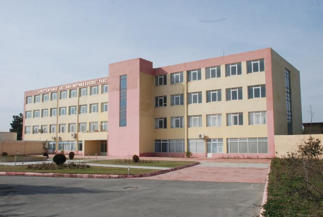 Zabrat zavod